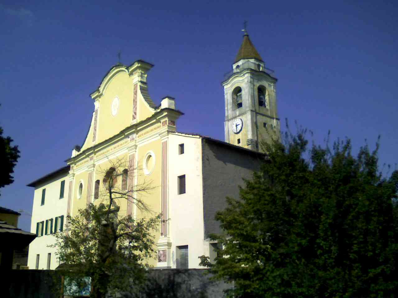 Mioglia (SV- Italy), chiesa parrocchiale